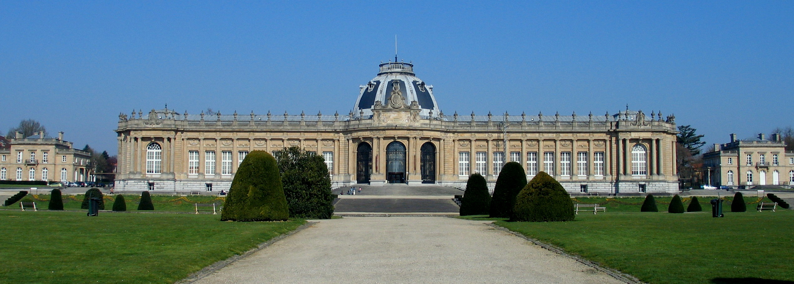 The Koninklijk Museum voor Midden-Afrika - own work by Paul Hermans